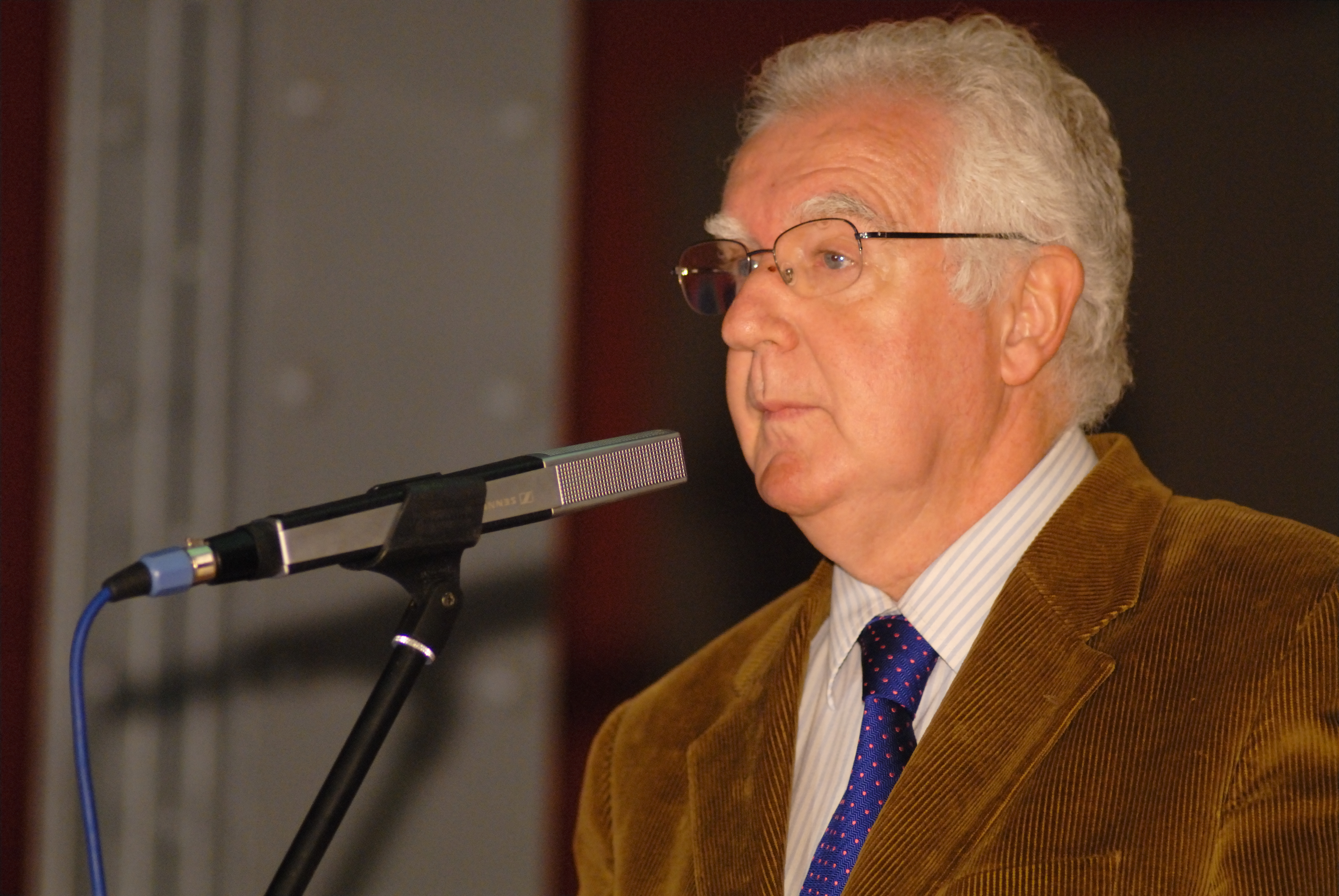 Jaume Sobrequés al MHC el 2007.